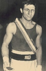 Immagine non artistica precedente il 1988